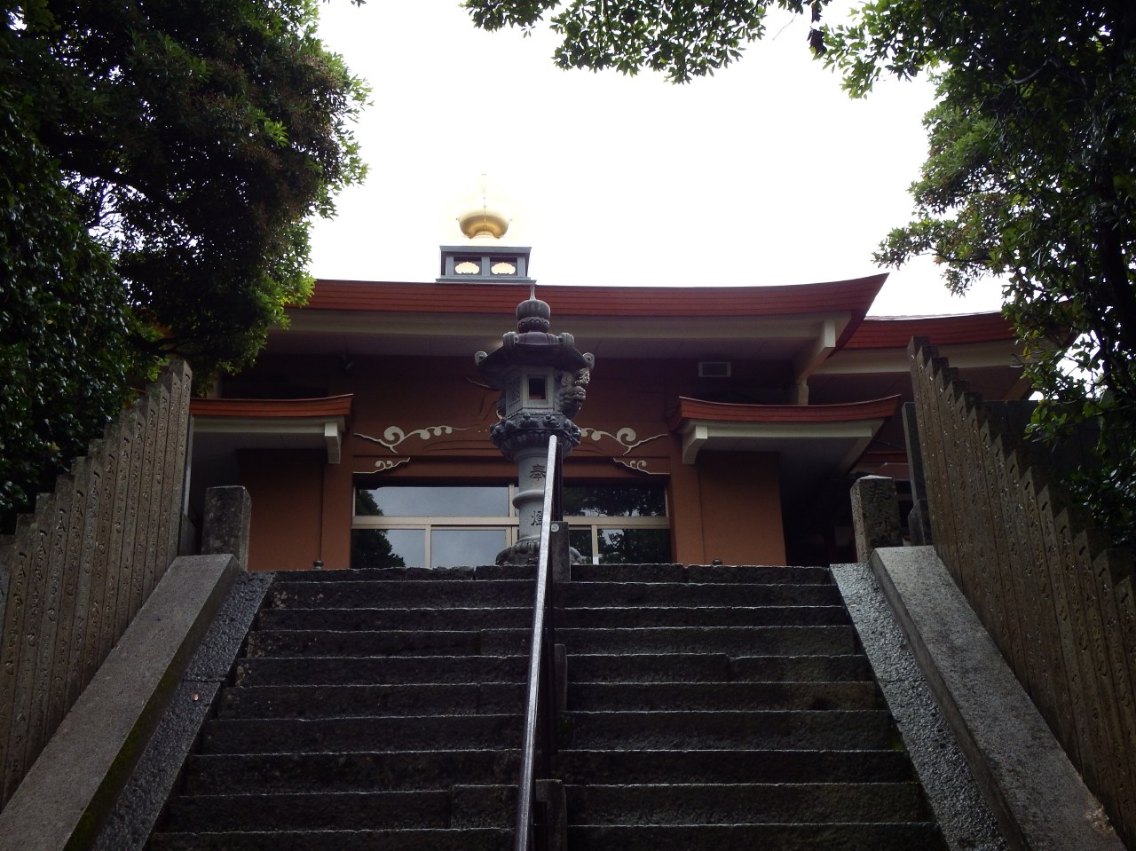 津照寺の本堂